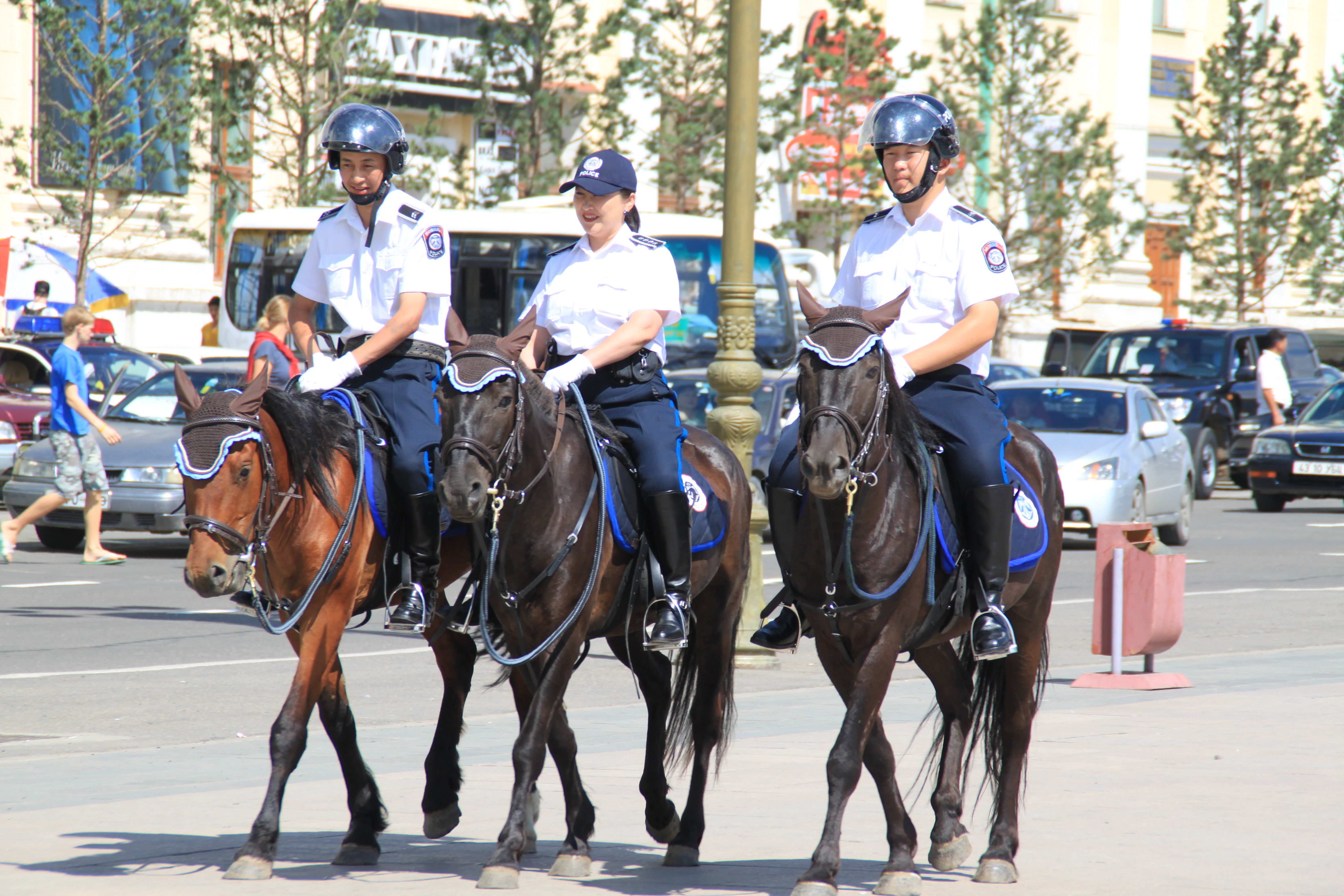 Berittene Polizei Ulaan Baatar 2010